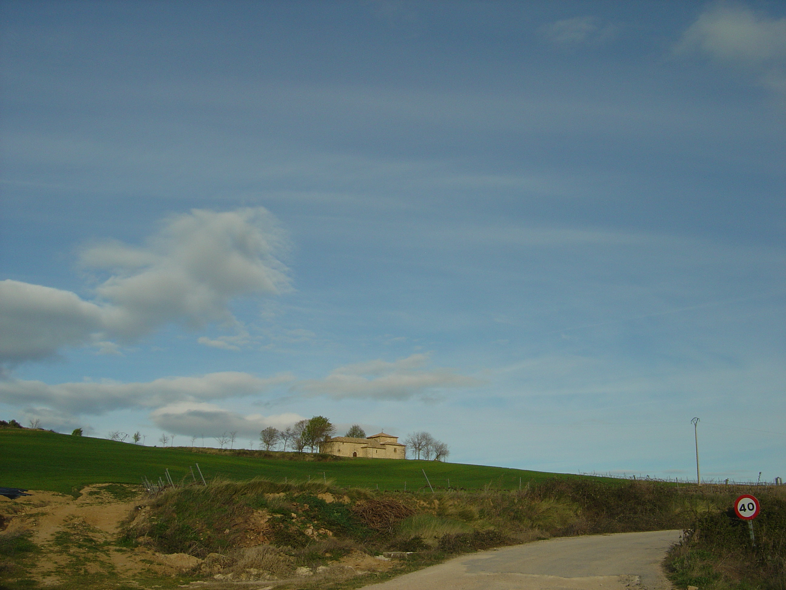 Arellano. Navarra. Spanien. Ermita de la Virgen de Unzizu